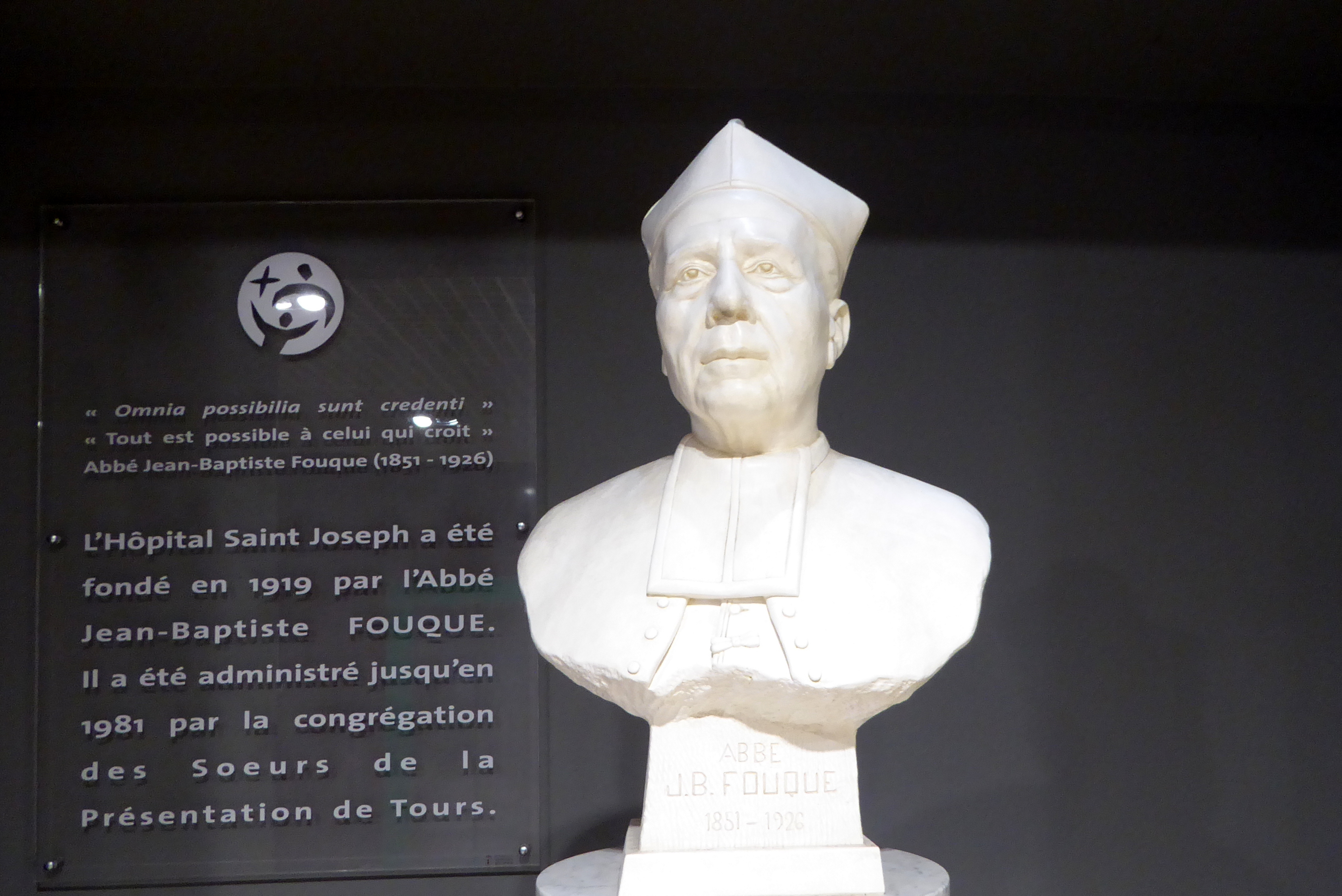 Buste de l'abbé Fouque à l'hôpital Saint-Joseph, Marseille Bouches-du-Rhône (France).